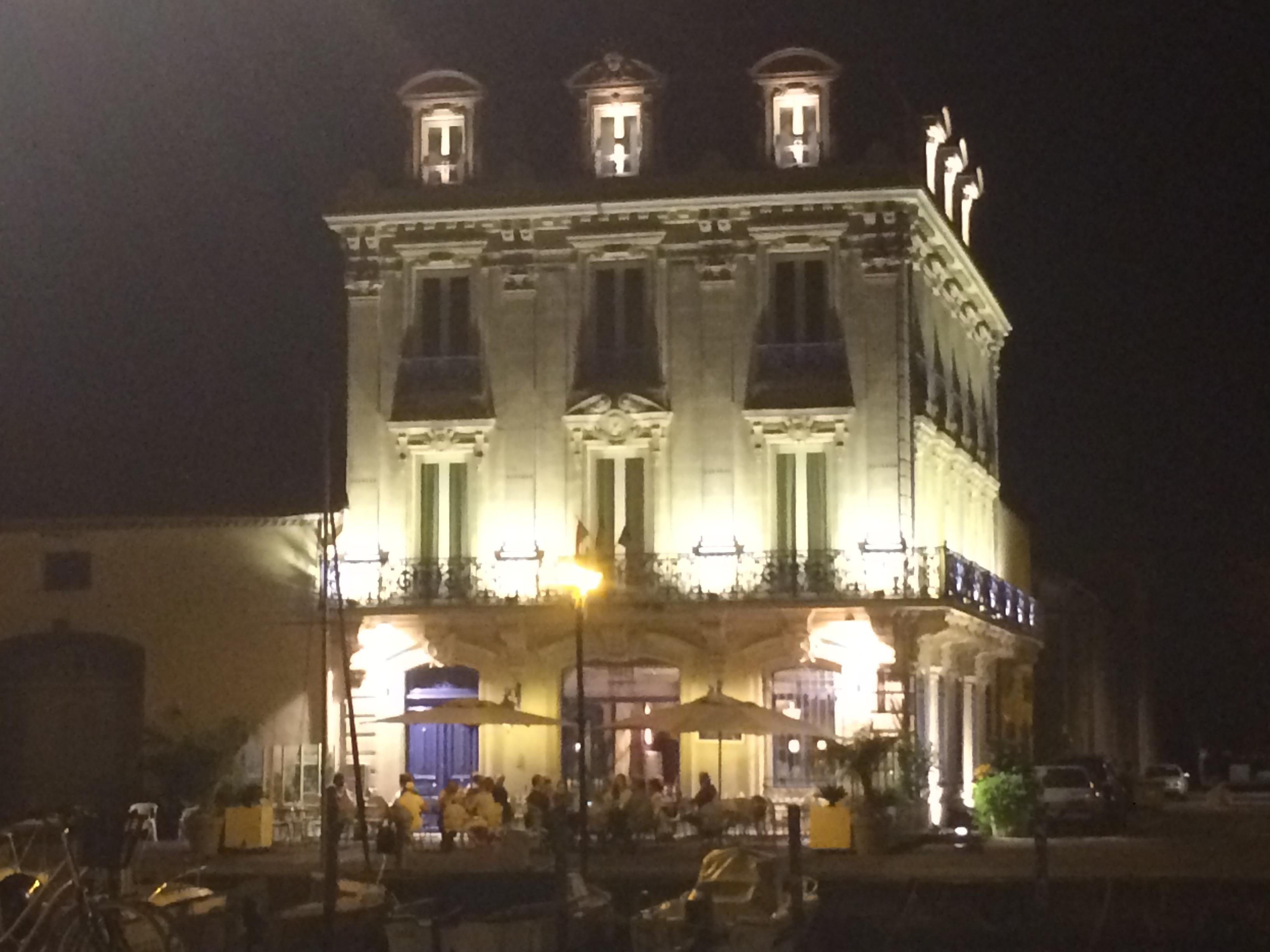 La maison du gouverneur